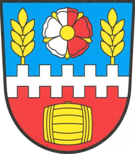 Bečváry znak